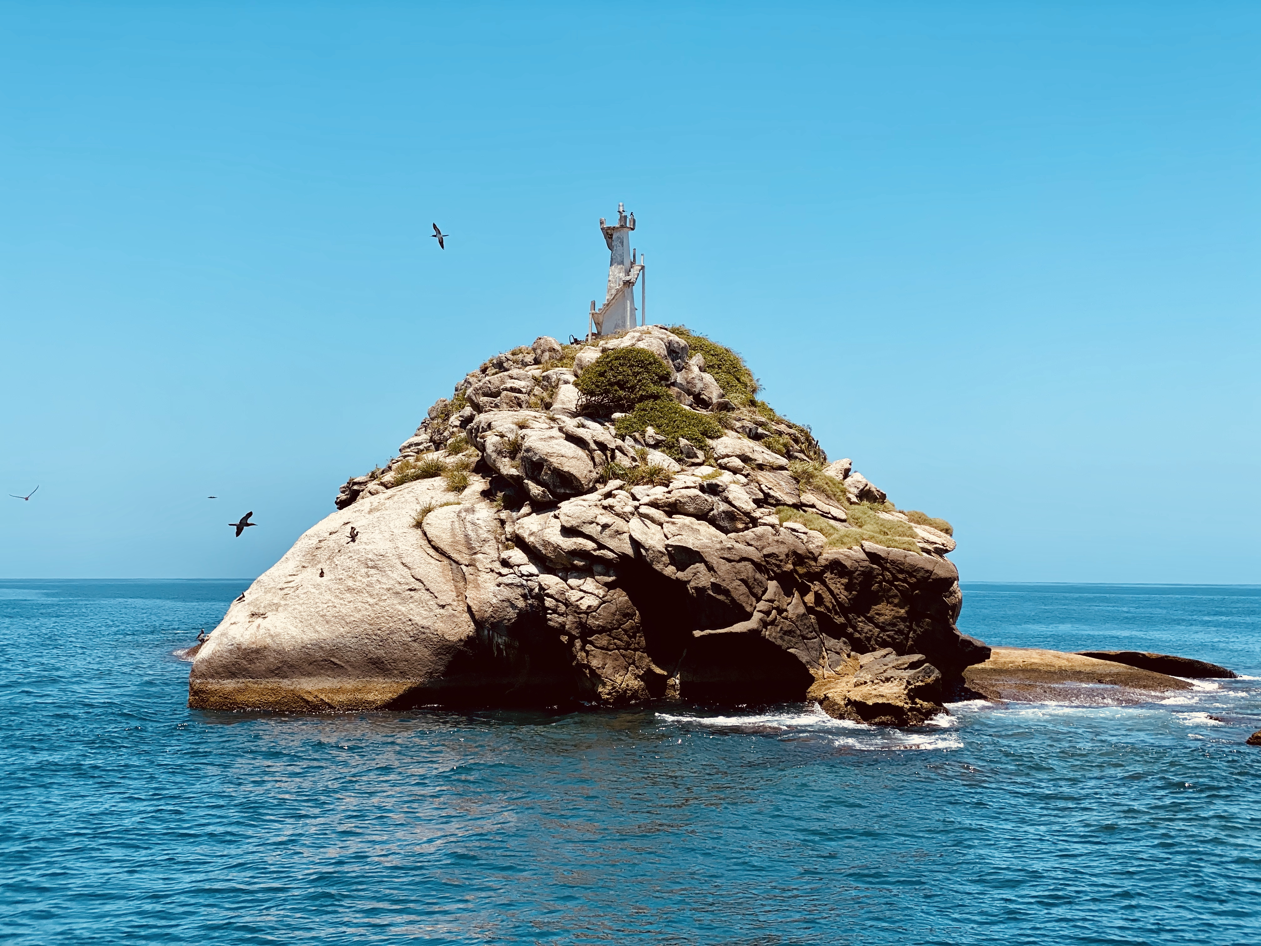 Ilha do Farol (ou Ilha do Sul) no arquipelago de Alcatrazes.